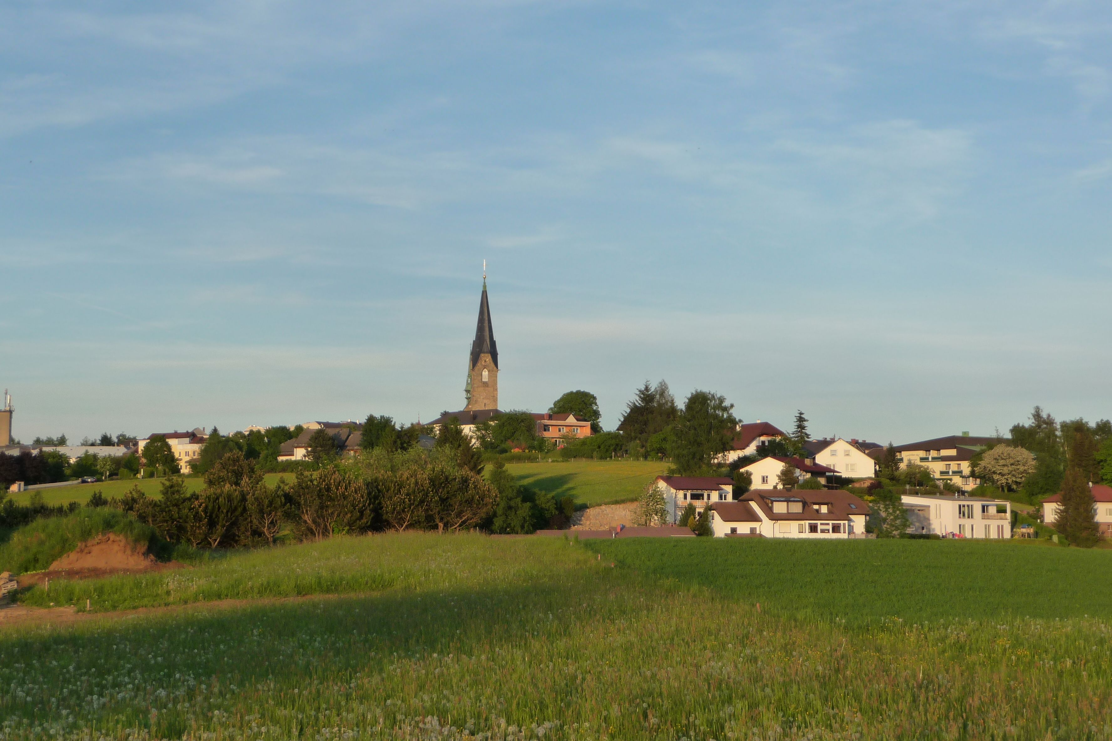 Bad Leonfelden von Westen gesehen